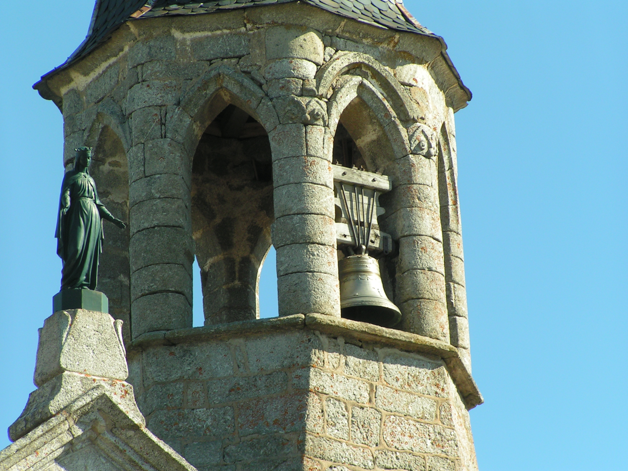 Eglise de la Chaze-de-Peyre